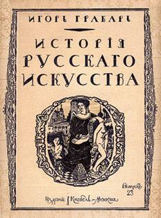 Обложка одного из выпусков «Истории русского искусства» издания И.Н. Кнебеля. 1910–1916 годы.Оформление Е. Лансере Частное загл. каждого тома на отд. тит. л. — Изд. неокончено, выходило выпусками. Вышло только 23 вып.: вып. 1-4 (т. 1), вып. 5-8 (т. 2), вып. 9-12 (т. 5), вып. 13-17 (т. 3), вып. 18-22 (т. 6), вып. 23 (т. 4). — На частных тит. л. т. 1-4-го общ. загл: «История архитектуры»; т. 5-го: «Барон Н. Н. Врангель. История скульптуры»; т. 6-го: «История живописи».